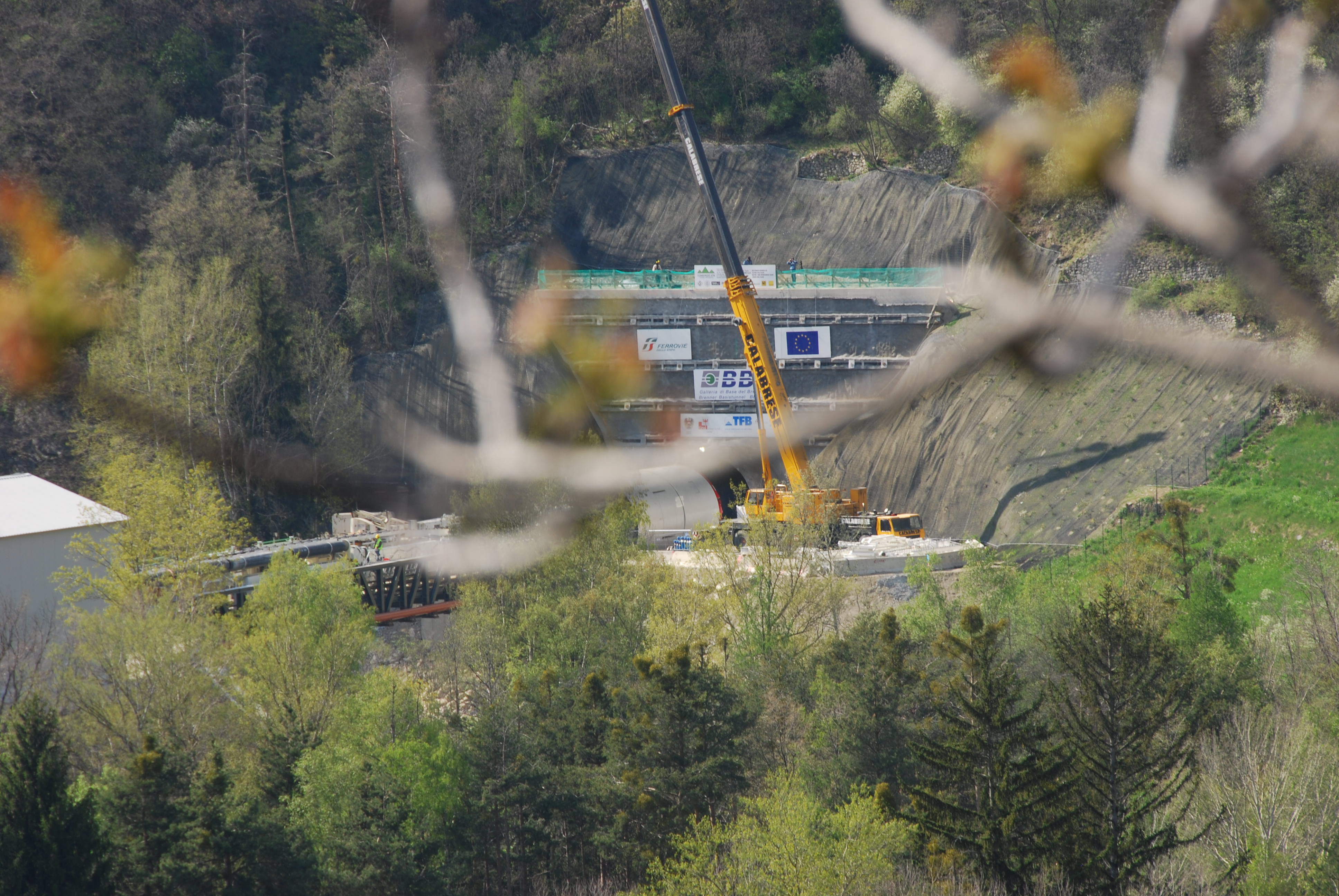 Galleria Tav